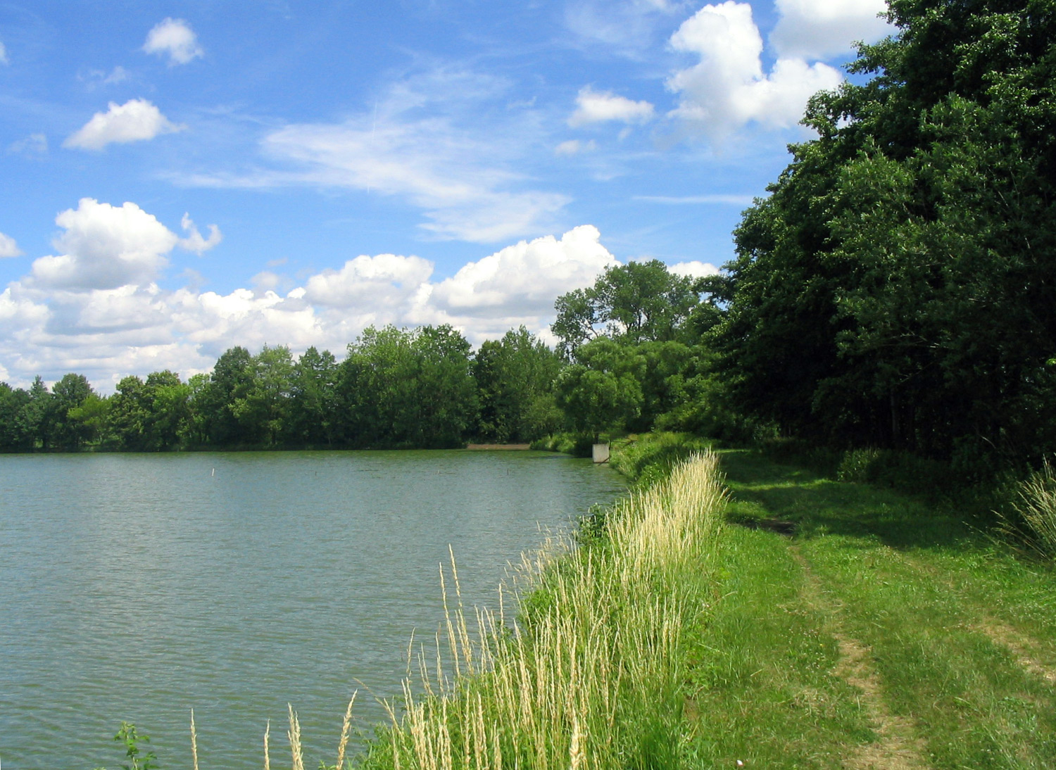 Touškovský rybník u Vsi Touškova, v okrese Plzeň-jih, pohled po hrázi.